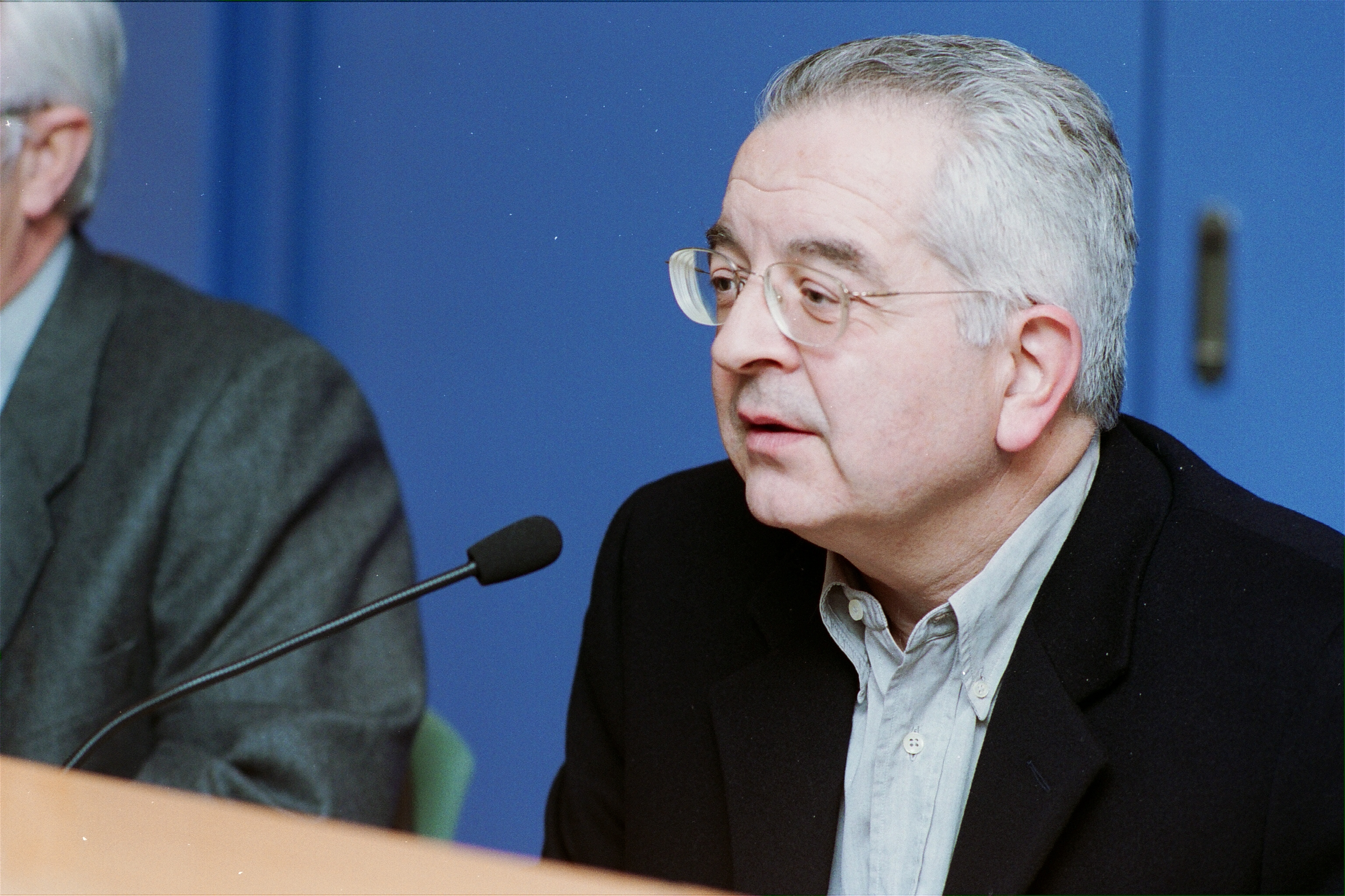 Borja de Riquer al MHC el 2001.